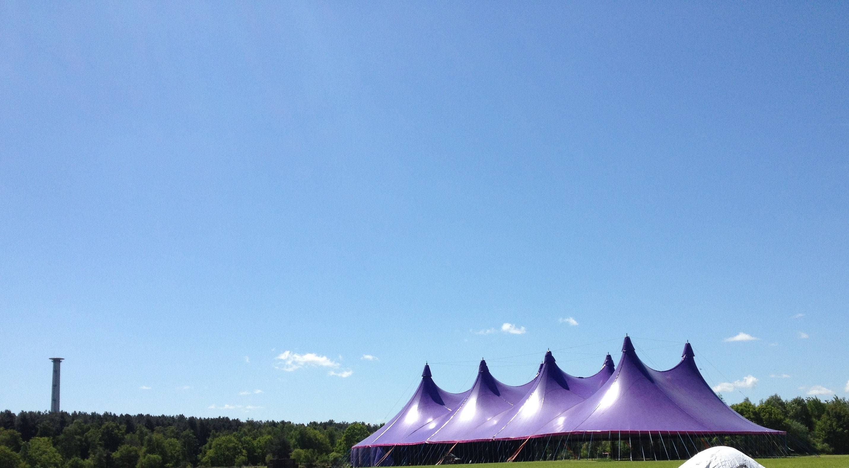 Marquee 2 in opbouw tijdens de voorbereidingsfase van Graspop 2013